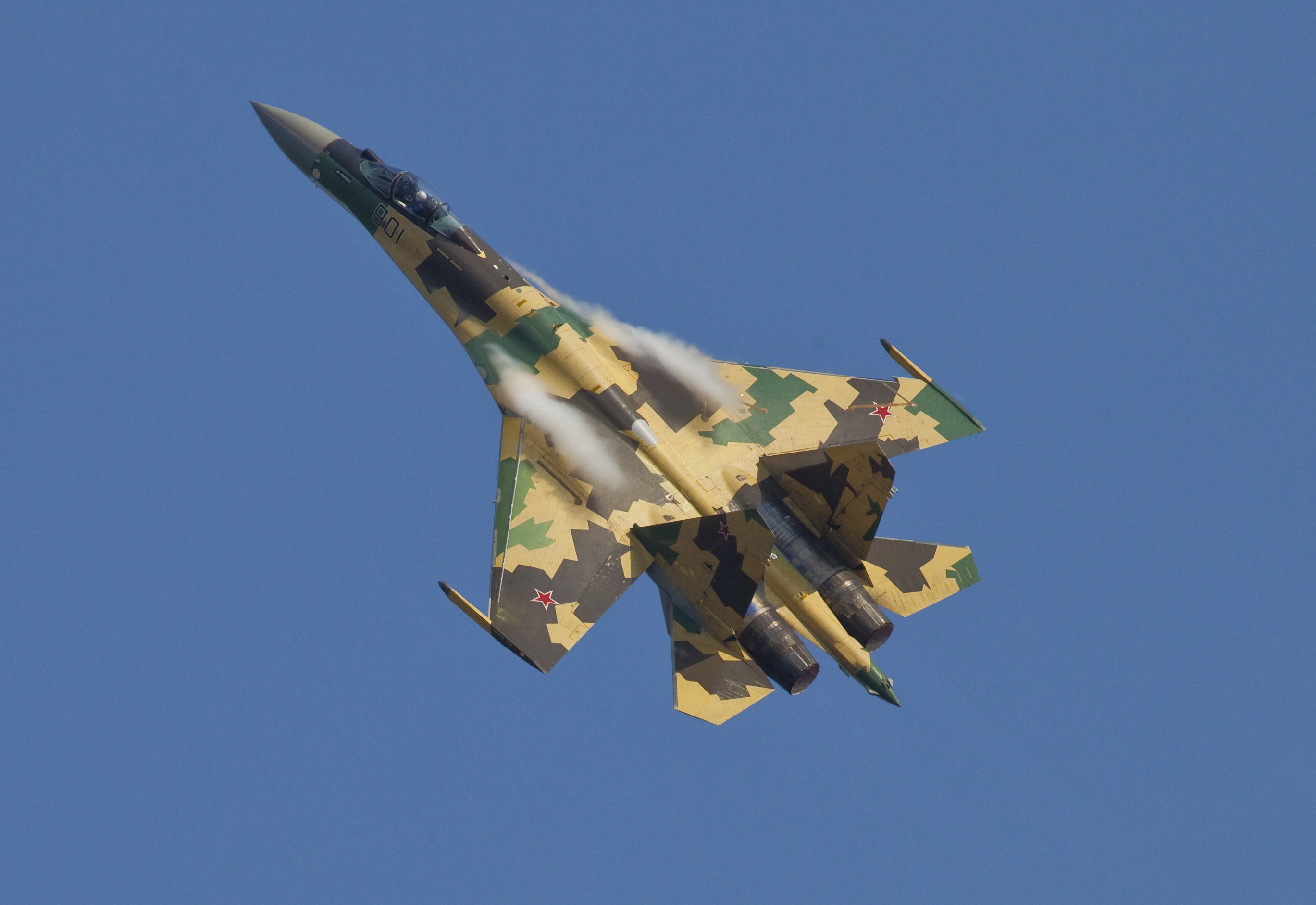 Sukhoi Su-35 at MAKS 2011